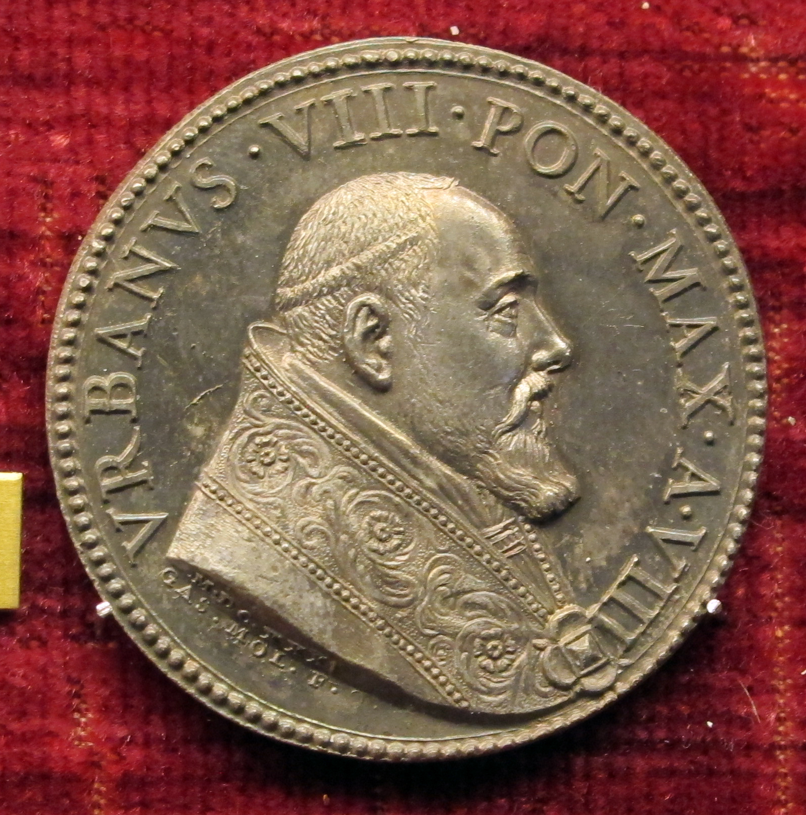 Papa Urbano VIII (1568-1644). Medaglie romane '600-'700